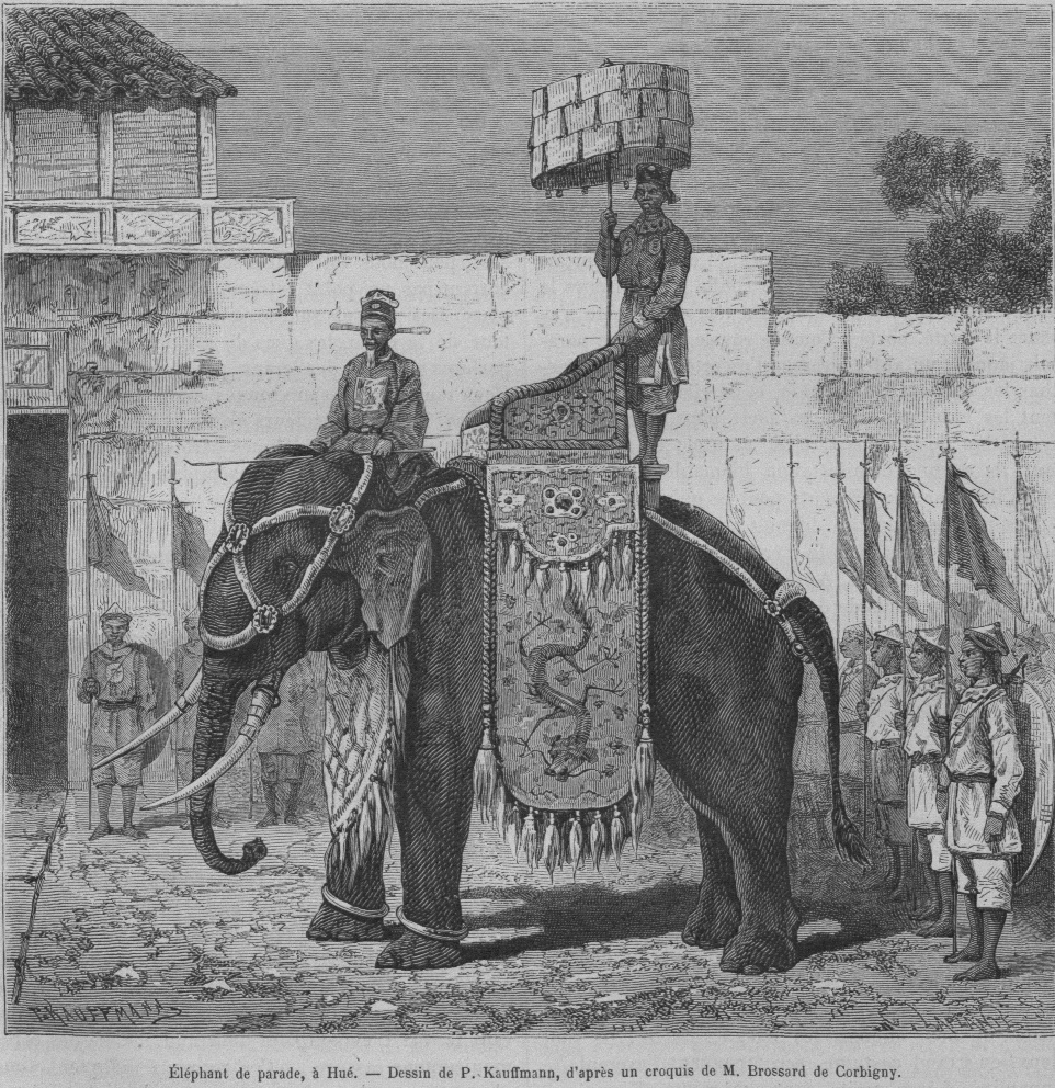 Diễu hành tại Huế